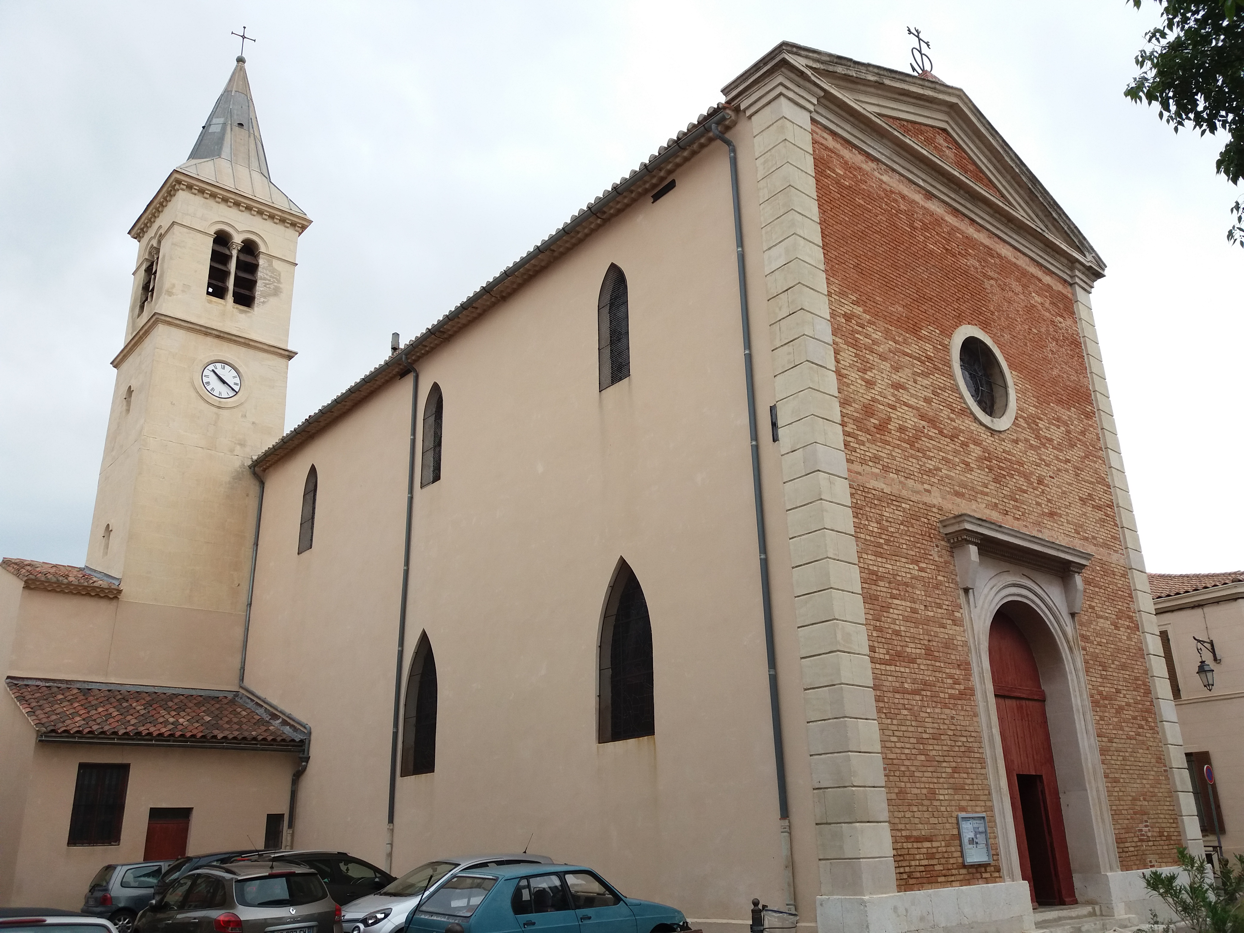 Église de l'Estaque.